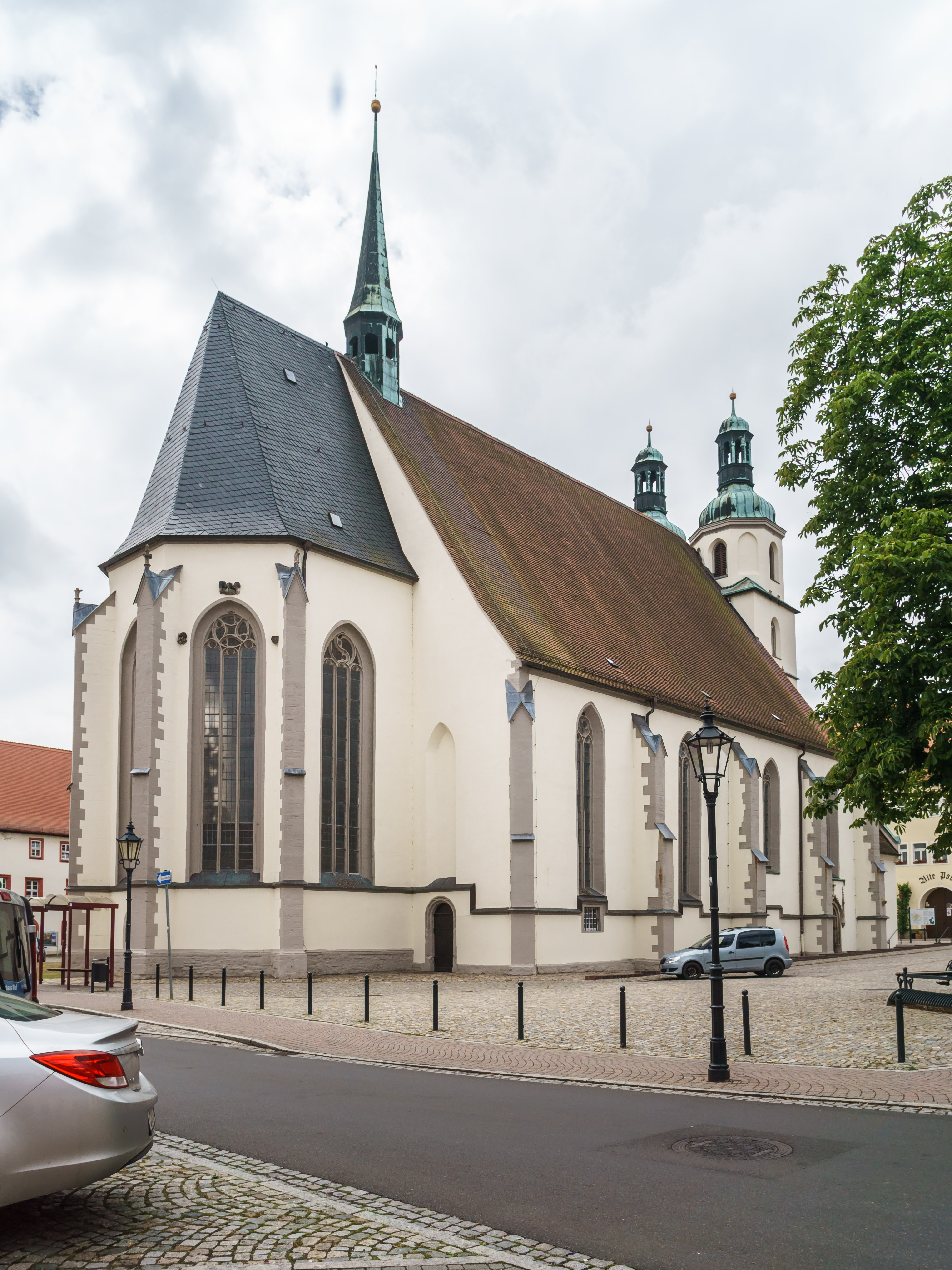 St. Laurentius, am Kirchplatz in Pegau